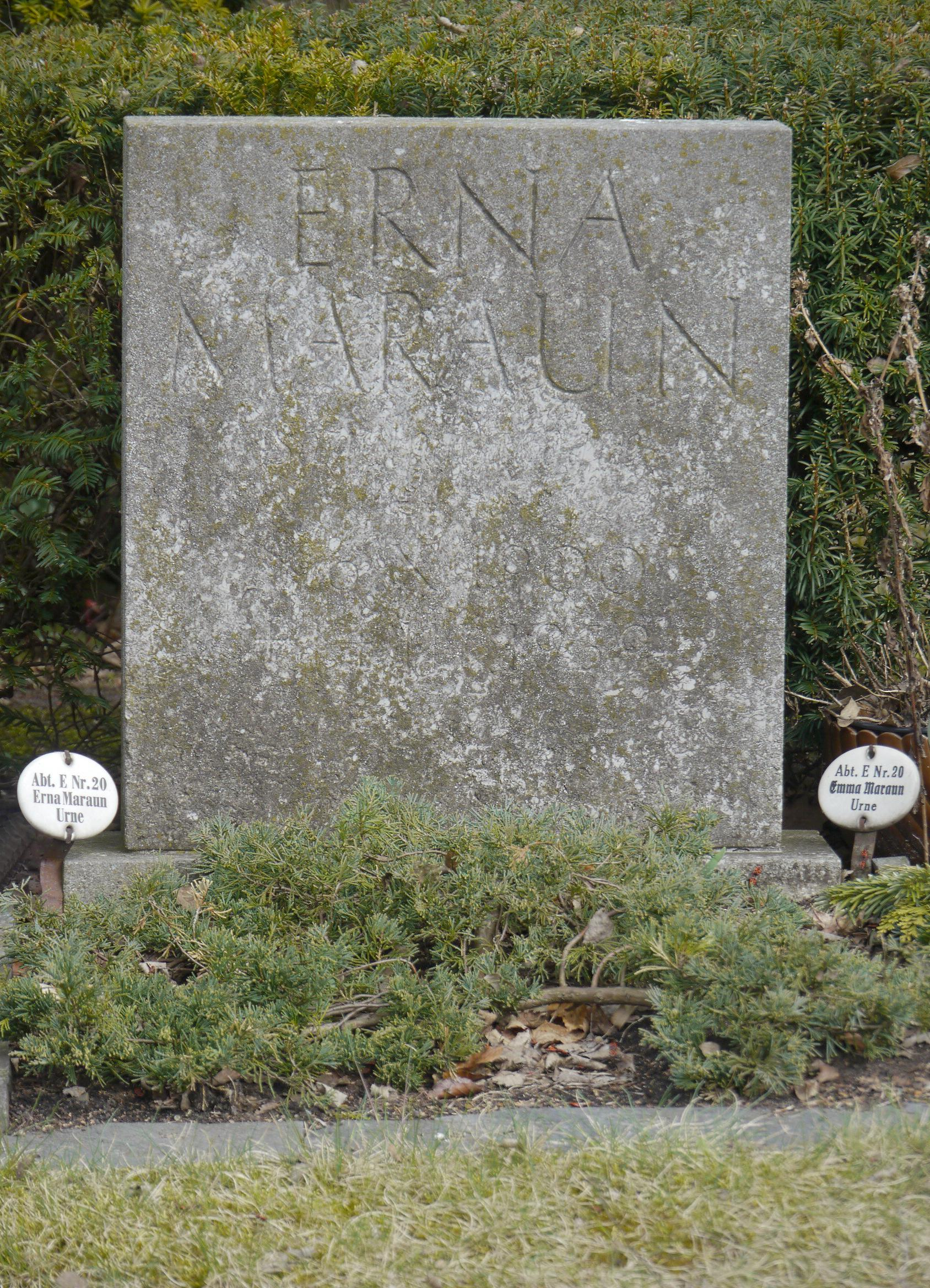 Urnengrab von Erna Maraun auf dem Kreuz-Friedhof in Berlin-Lankwitz